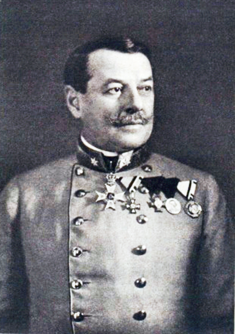 Viktor Graf von Scheuchenstuel (1857–1938), Austrian-Hungarian general